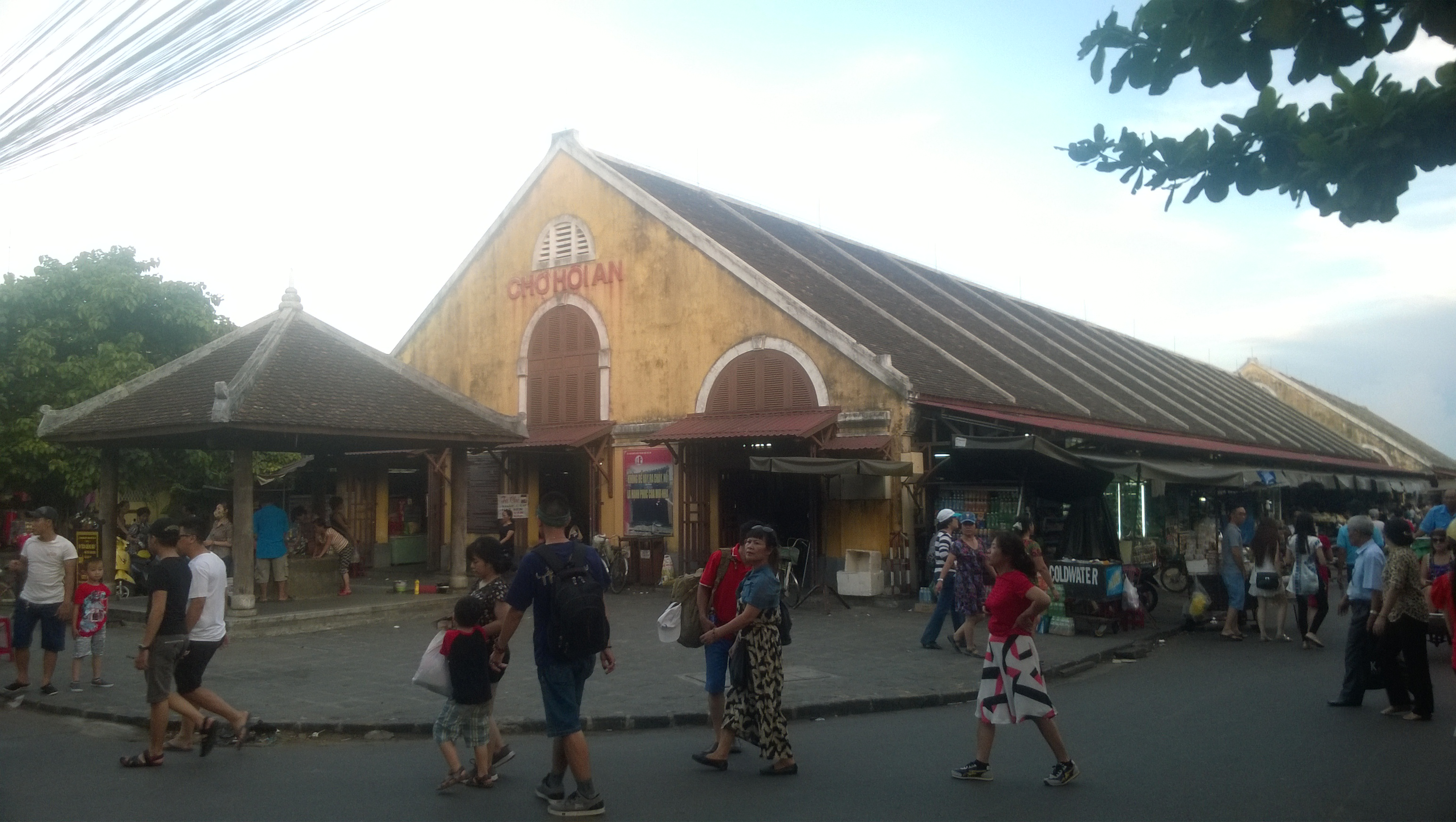 Chợ Hội An, Quảng Nam